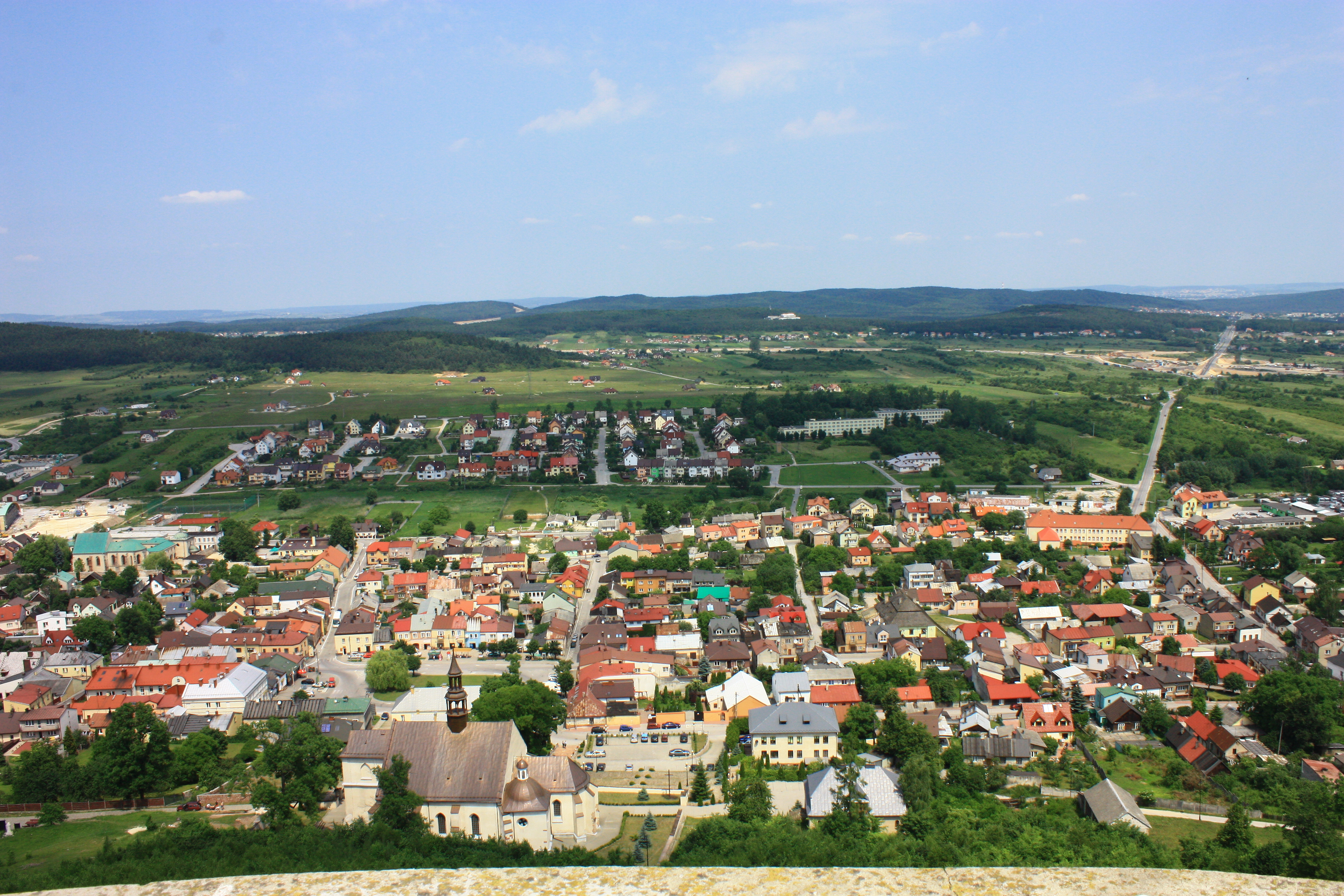 Chęciny, układ urbanistyczno-krajobrazowy miasta